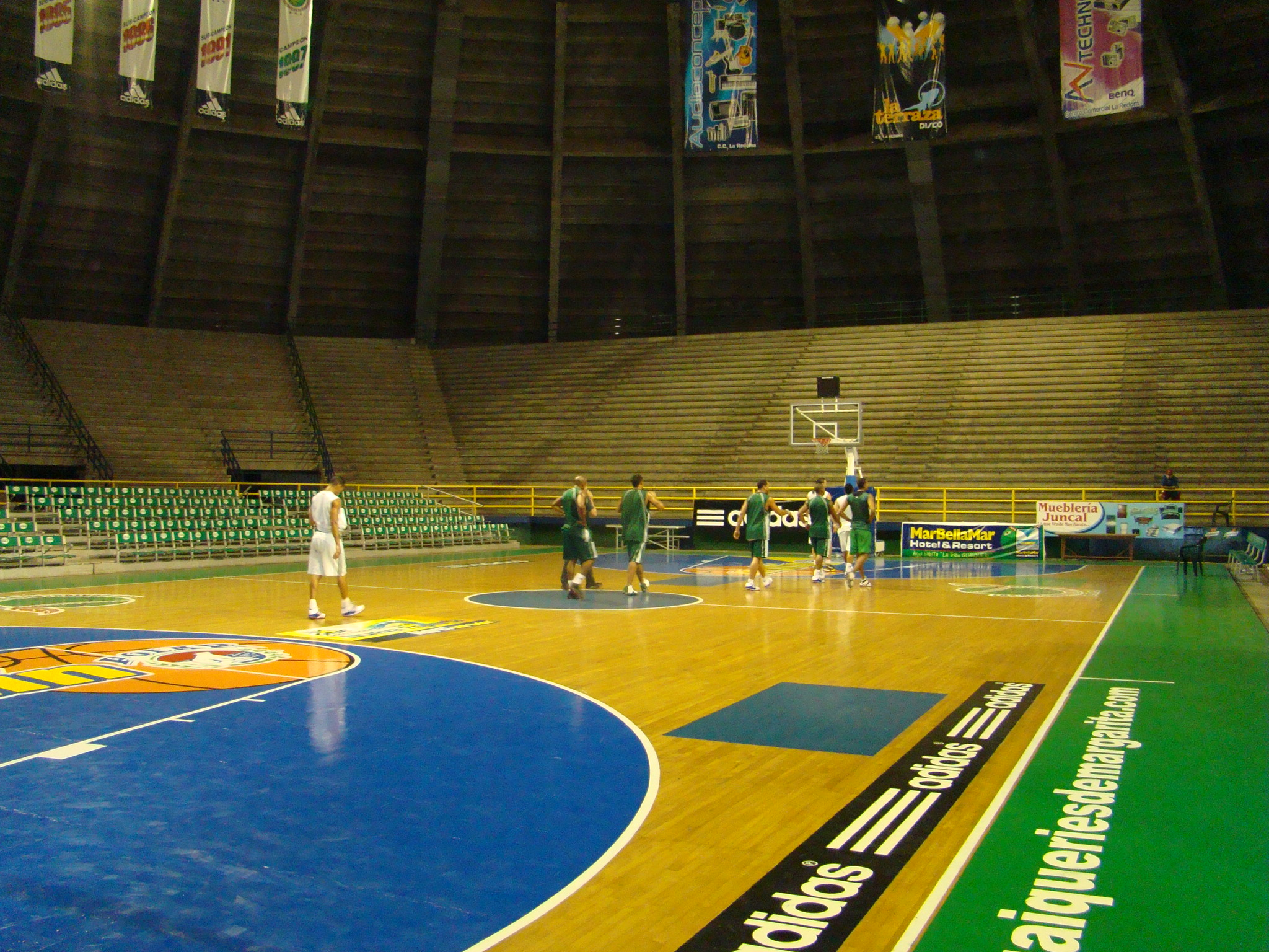 Práctica de los Guaiqueríes, equipo de baloncesto Neoespartano, Venezuela.